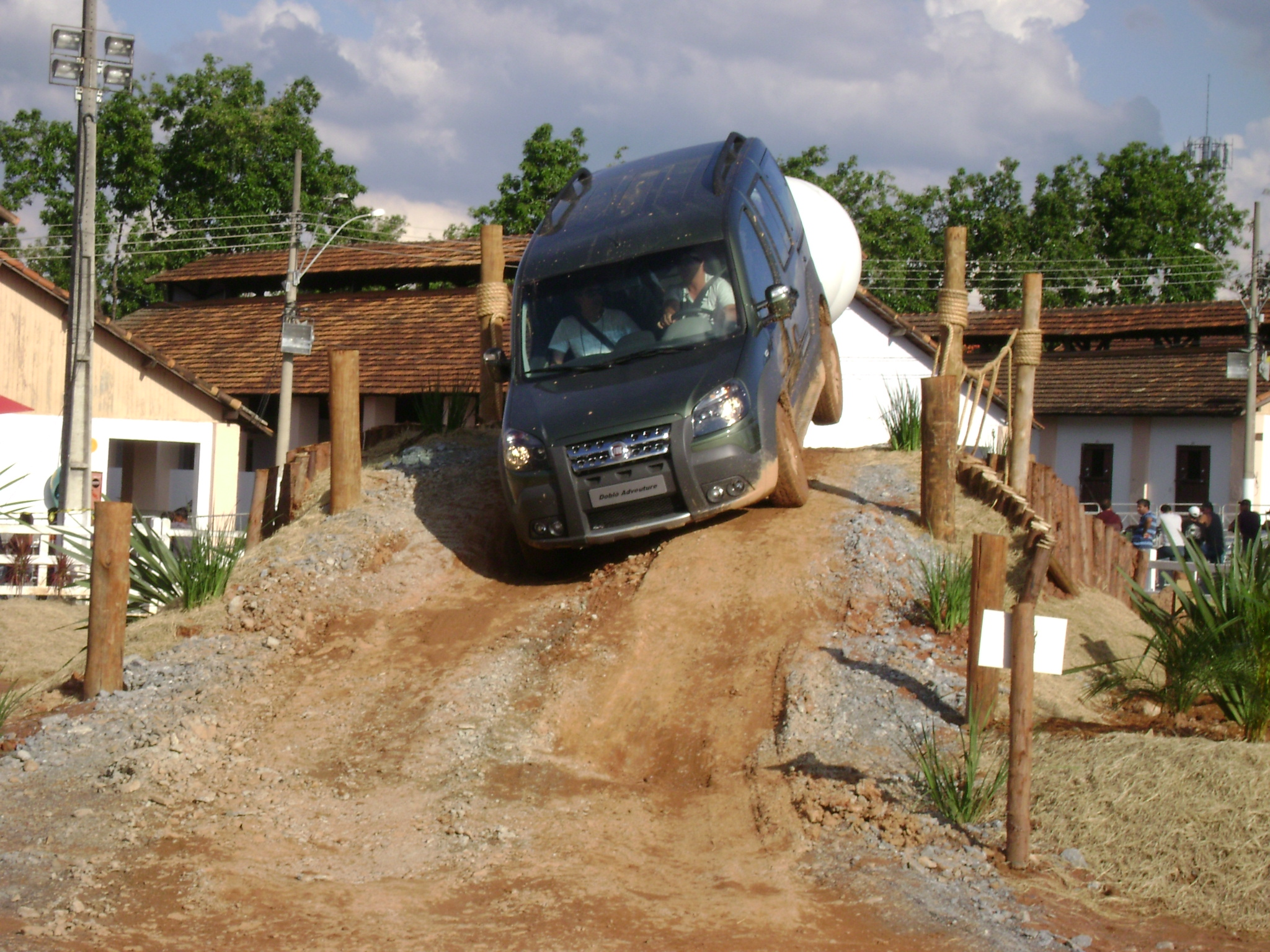 Pista de test drive na Bienal do Automóvel, em Belo Horizonte, Minas Gerais, Brasil.